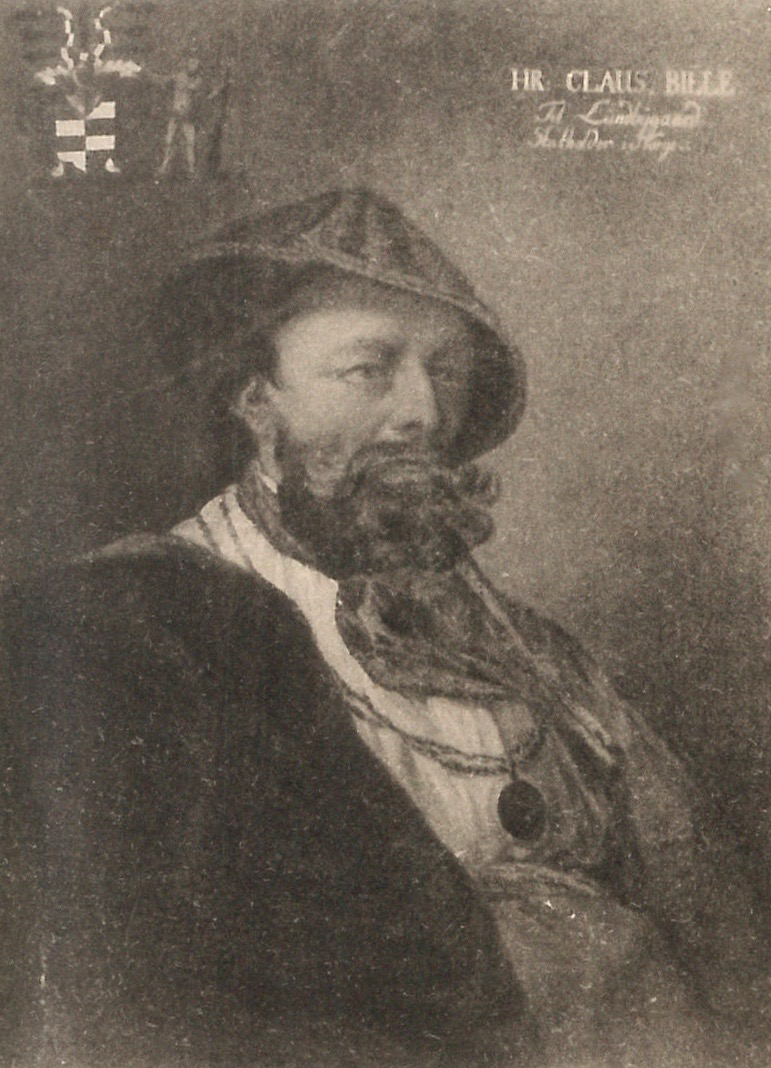 Hr. Claus Bille †1558